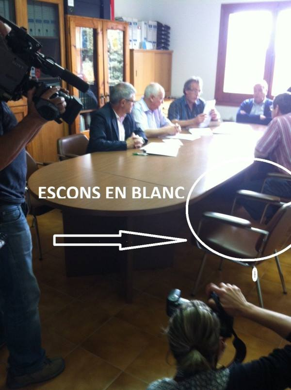 Fotografía del pleno de Foixá (Girona) el 11 de junio de 2011 tras la celebración de las elecciones municipales. Escaños en Blanco consiguió 2 escaños, divulgando esta imagen junto a la indicación de uno de los 2 escaños vacíos (Escons en blanc).